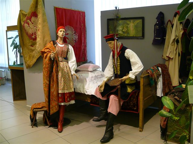 Fragment wystawy "Zapomniane dziedzictwo Nowej Huty - Pleszów"